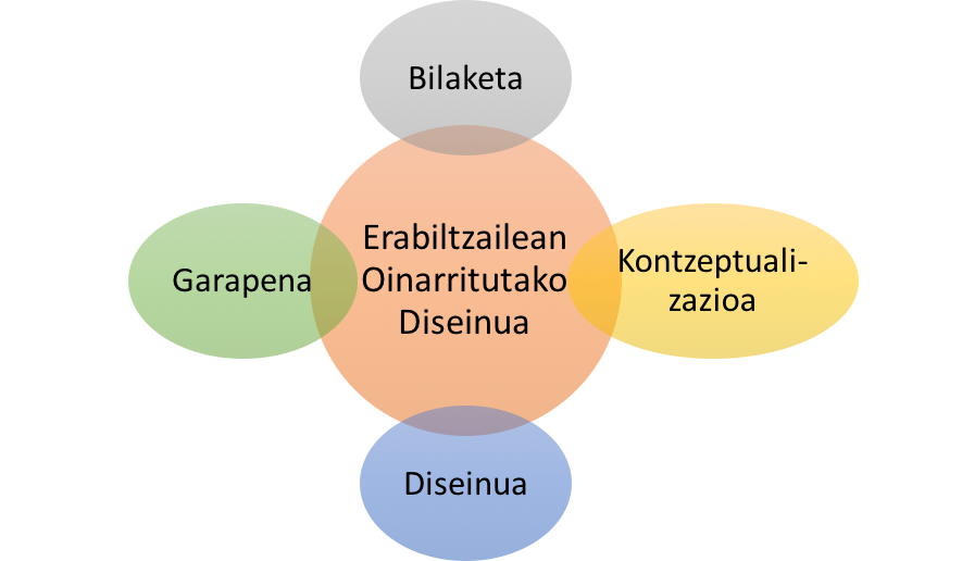 Erabiltzailean Oinarritutako Diseinua